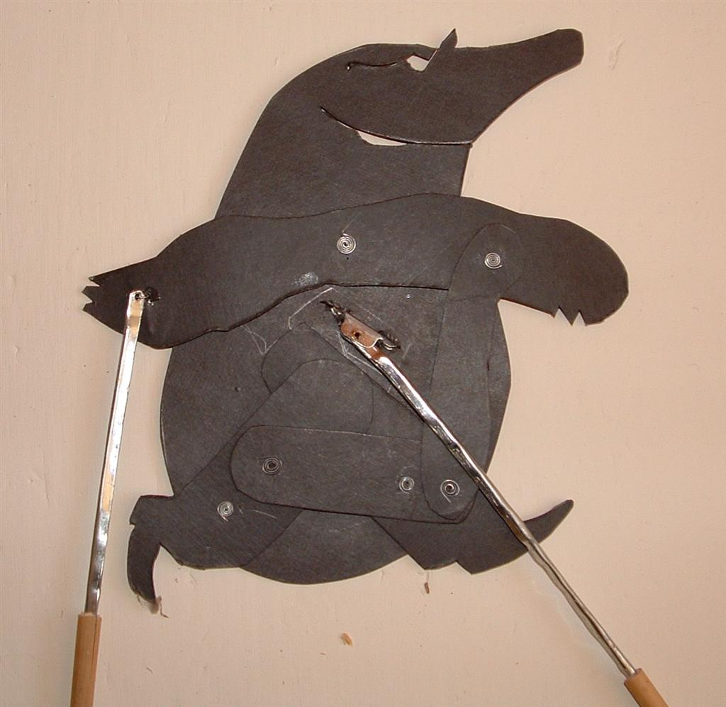 Schimpop Hans Teunissen